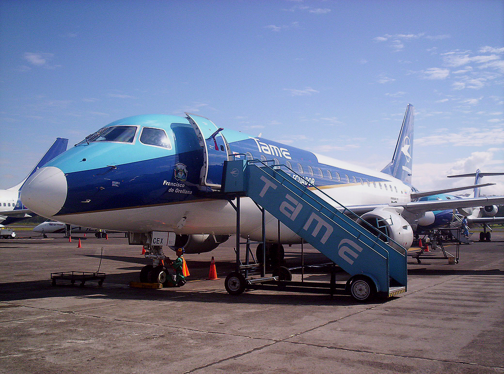 TAME